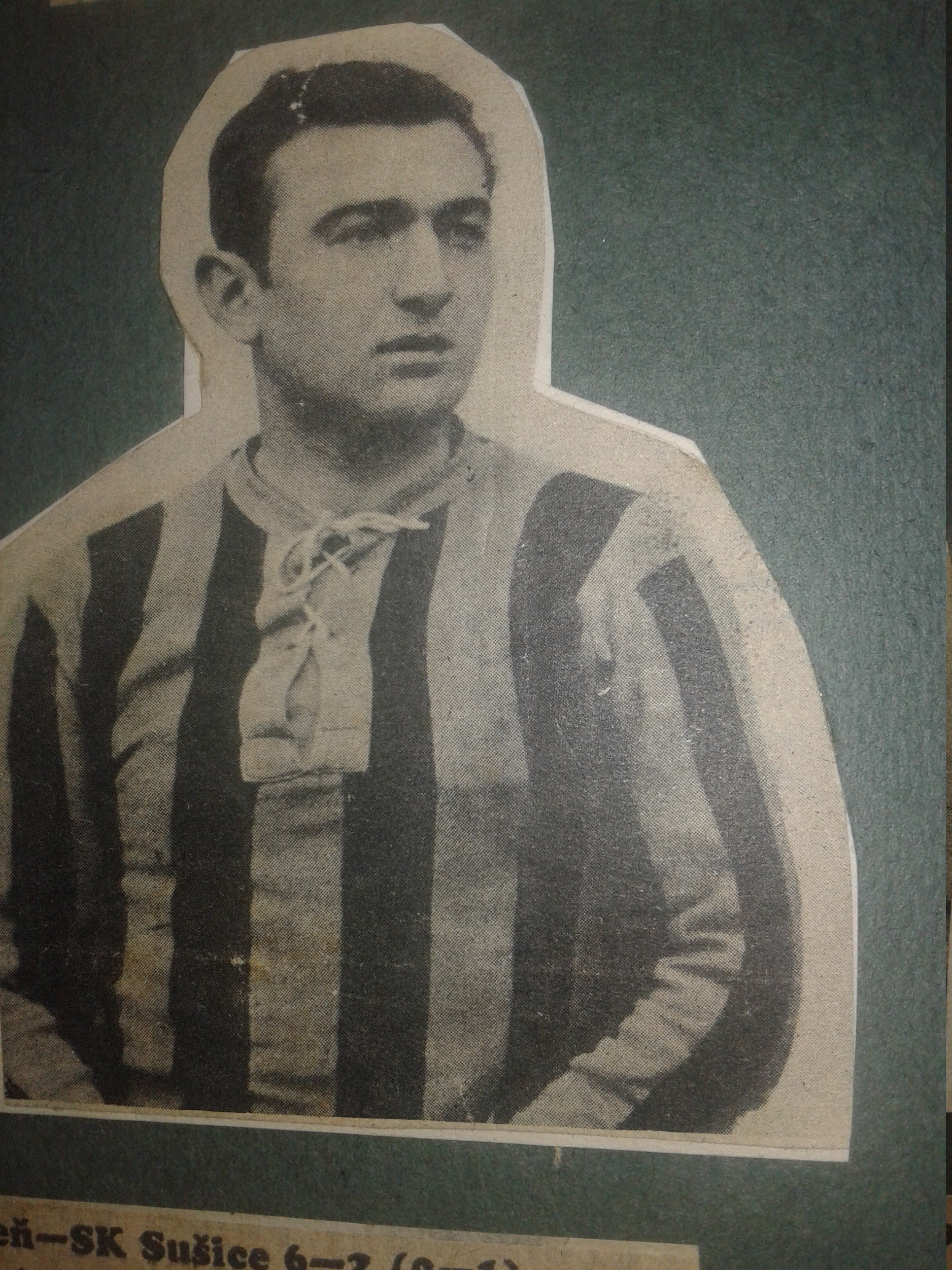 František Gibic (27. května 1914 Březiněves - 27. listopadu 1988, Praha) byl československý fotbalista, útočník, levé křídlo. Po skončení aktivní kariéry působil jako rozhodčí a trenér.